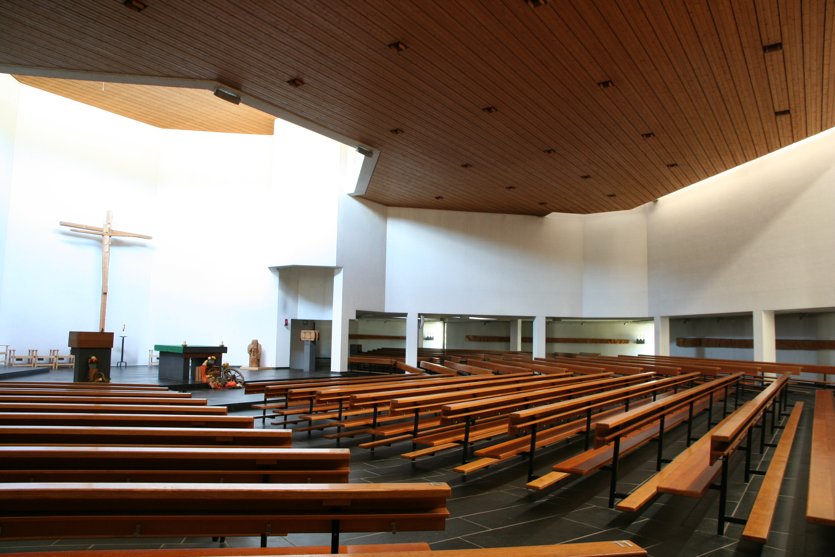 Römisch-katholische Pfarrkirche St. Felix und Regula Wattwil